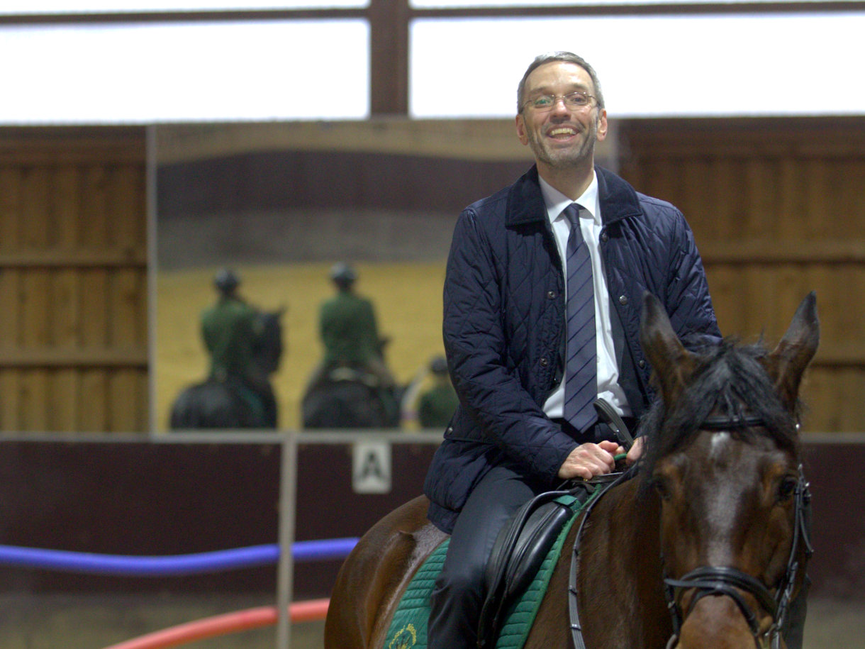 Herbert Kickl, österreichischer Politiker (FPÖ). Seit Dezember 2017 Bundesminister für Inneres der Republik Österreich. Hier während seines Besuchs der Reiterstaffel der Polizeiinspektion ED 4 am 15. Februar 2018 in München. Titel des Werks: "Herbert Kickl (Feb. 2018)"